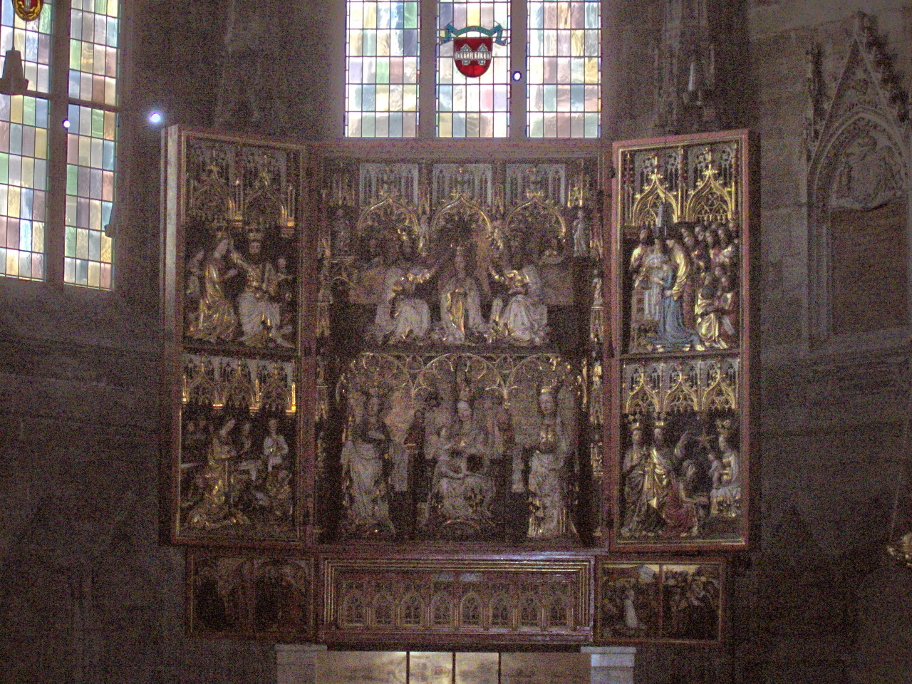 Wiener Neustädter Altar in the Stephansdom in Vienna, Austria